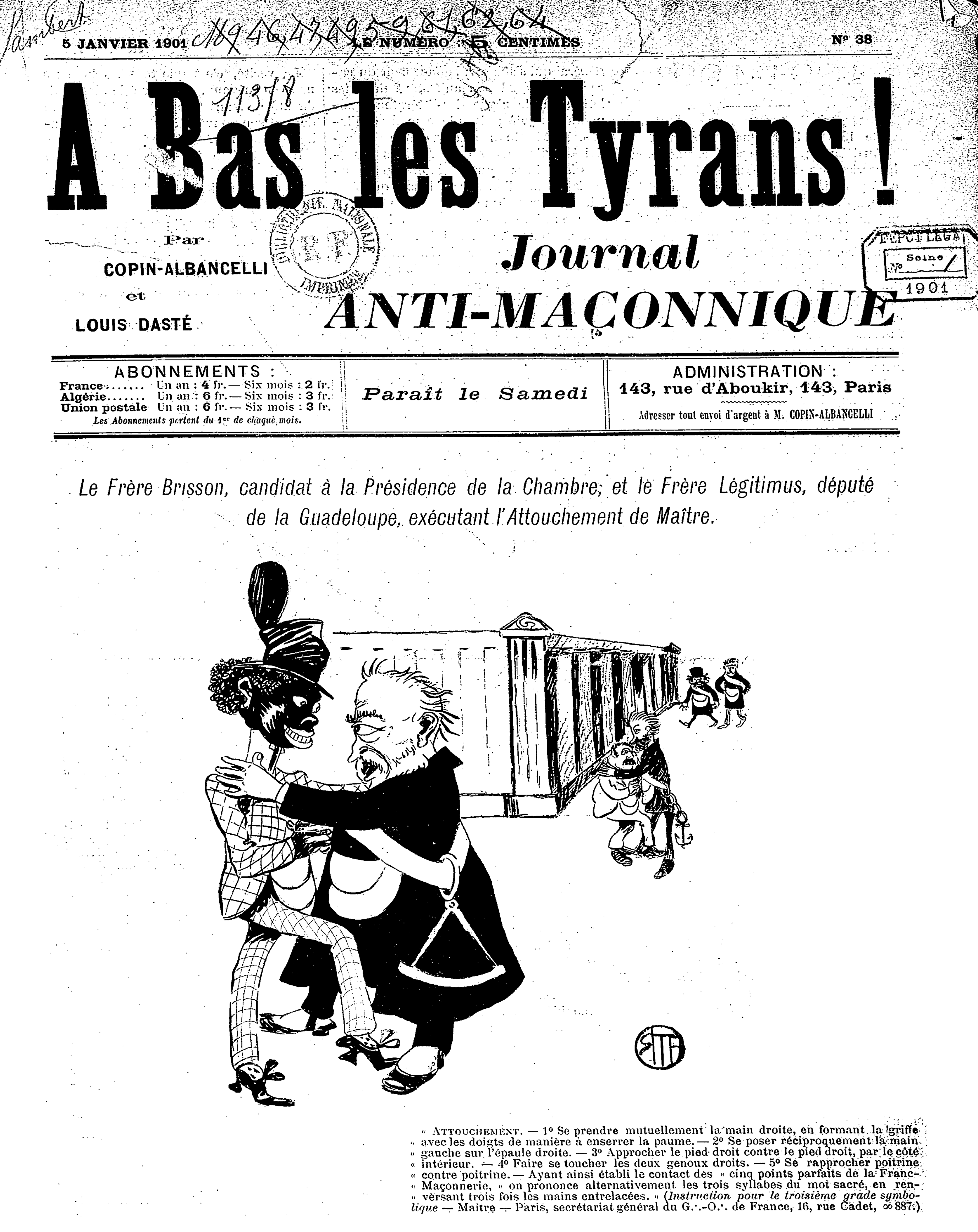 Caricature du journal antimaçonnique "A bas les tyrans" paru dans les numéros 36 du 22 décembre 1900 & 38 du 5 janvier 1901.